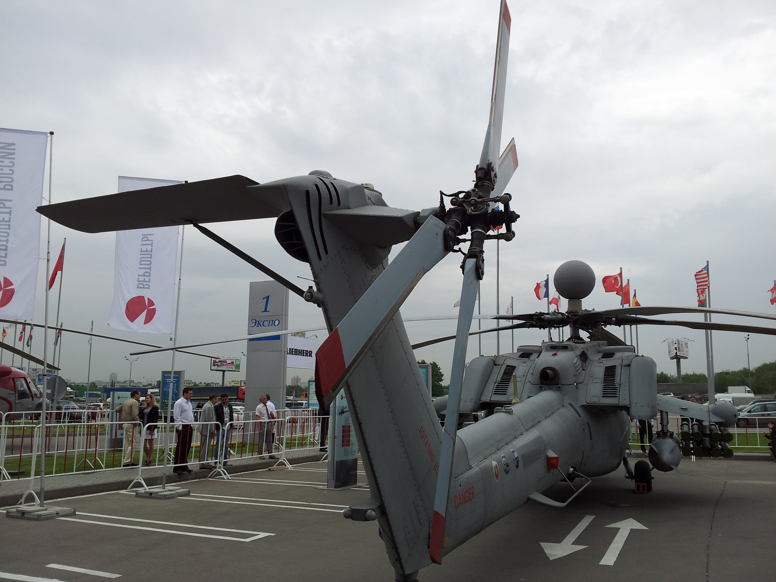 Вид с хвоста вертолета Ми-28 на выставке HeliRussia 2012